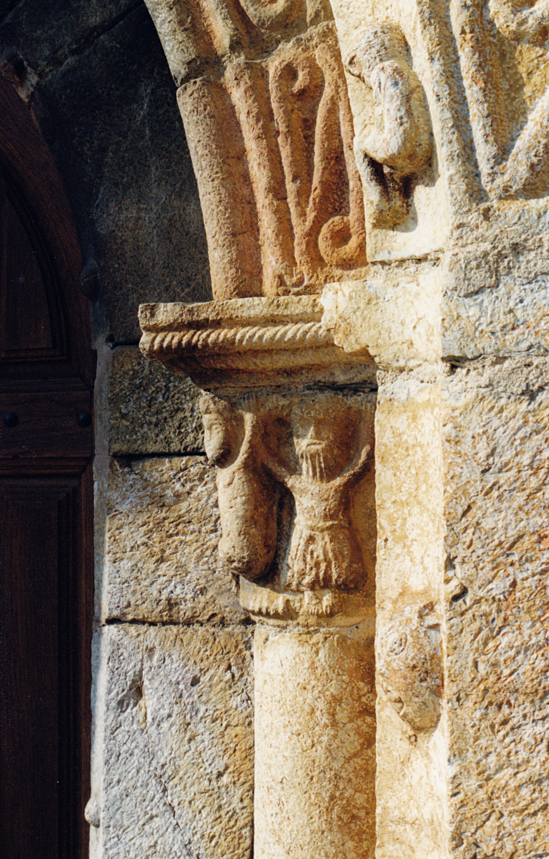 Espagne - Basse Cerdagne - Église Sainte-Marie d'All